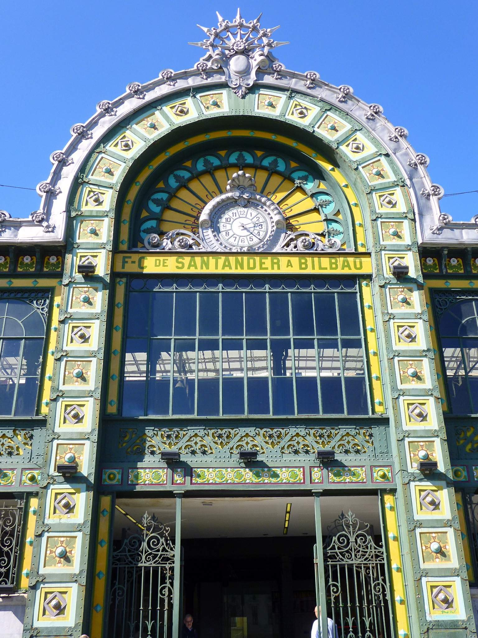 Estacion de FEVE Concordia, en Bilbao